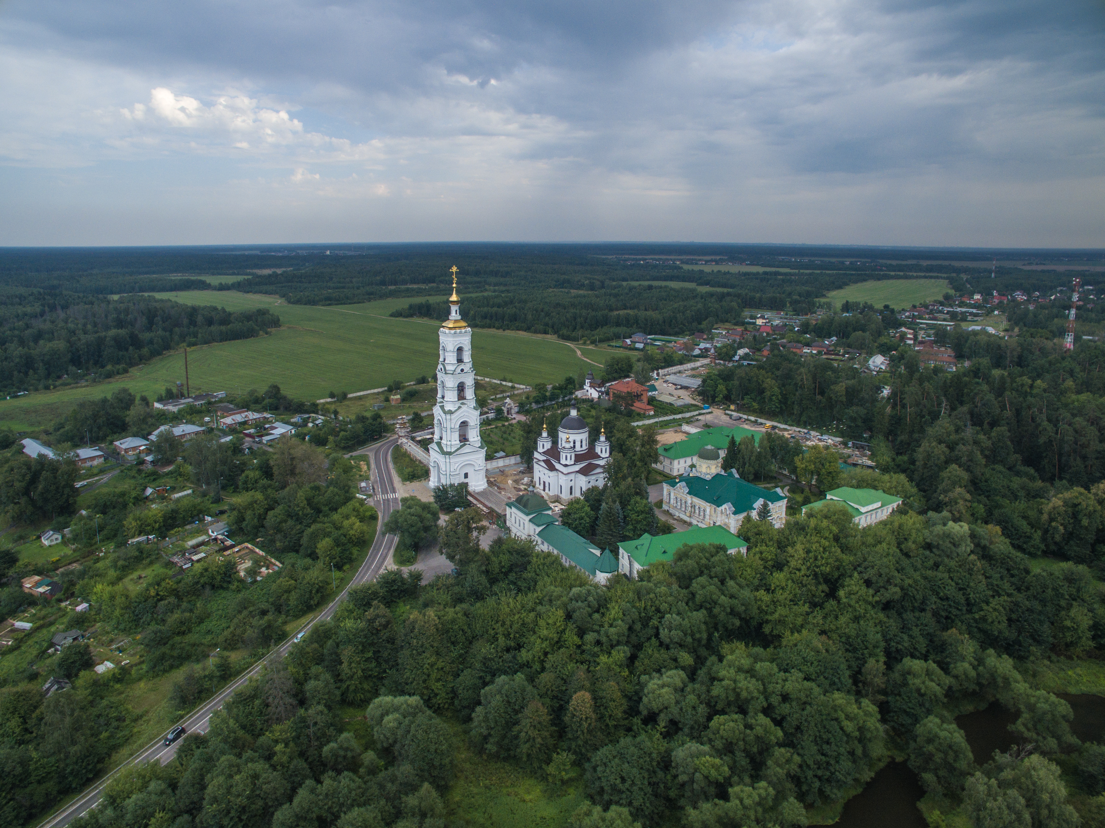 Николаевская Берлюковская пустынь: Авдотьино, Ногинский район, Московская область